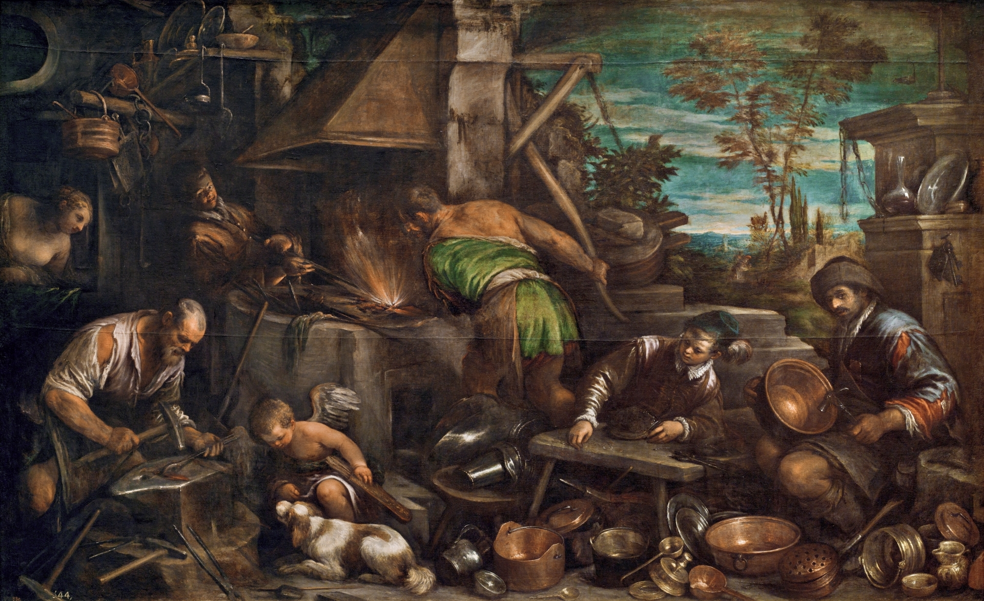 La obra representa al dios Vulcano en su fragua.